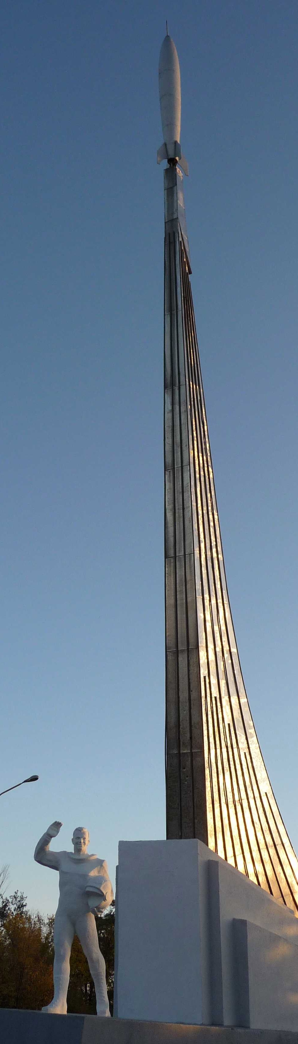 Das Denkmal am Landeplatz nach der Erdumrundung bei Engels